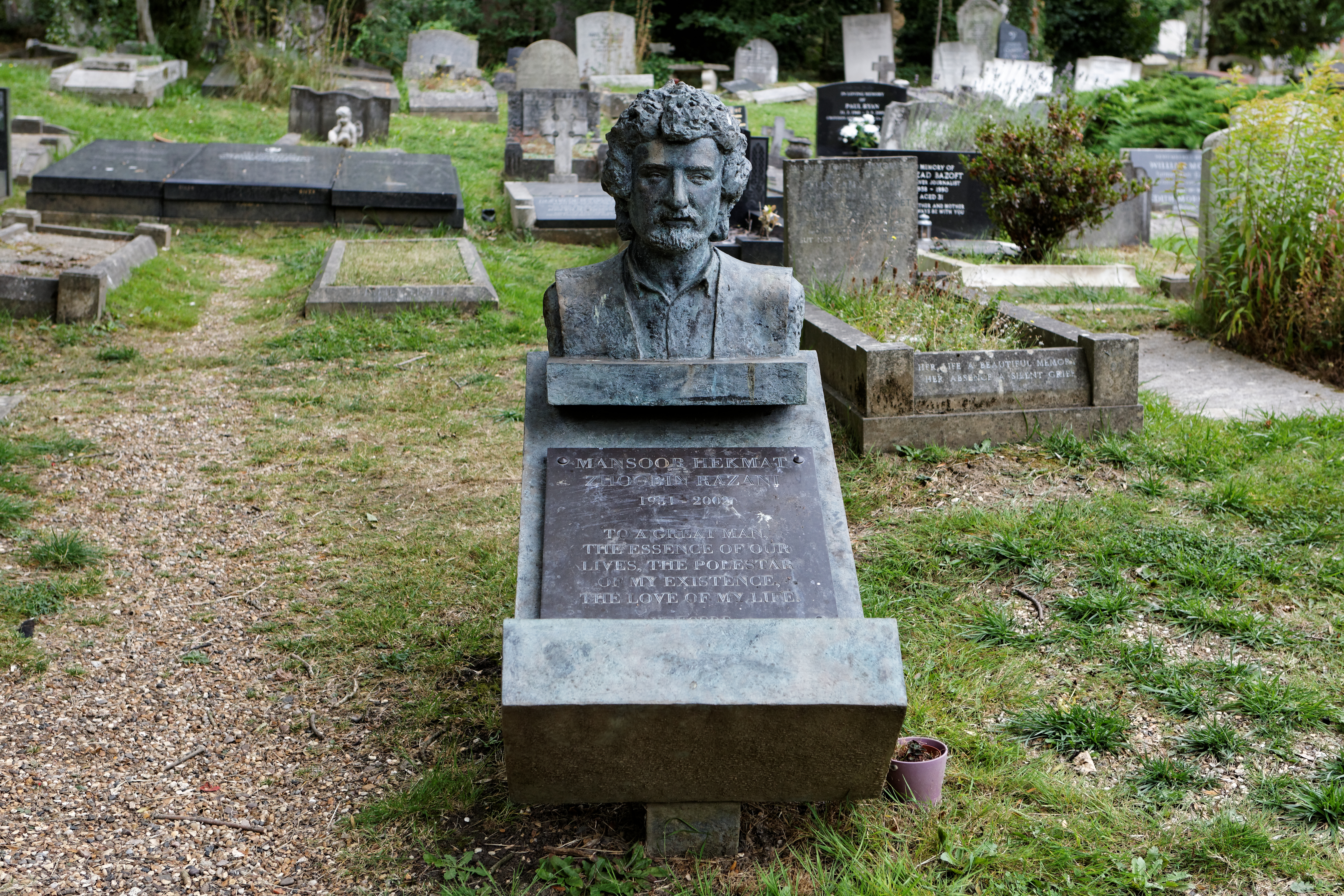 Sépulture de Mansoor Hekmat (1951-2002), théoricien marxiste iranien. Il est en opposition à la politique du Shah et, après la Révolution iranienne de 1979 a dirigé le Parti communiste-ouvrier d'Iran (WPI), opposé à la République islamique d'Iran.